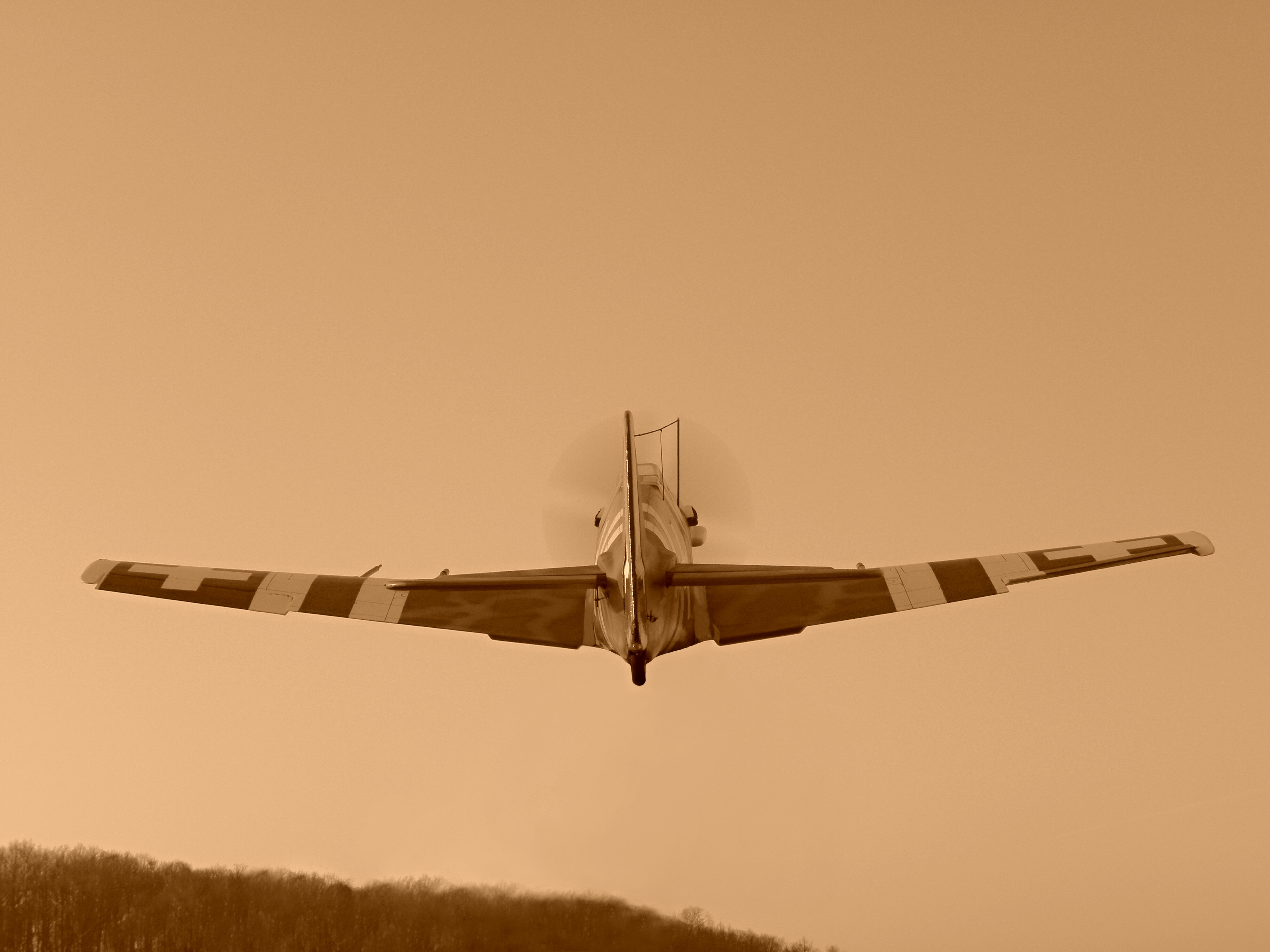 Doflug D-3802